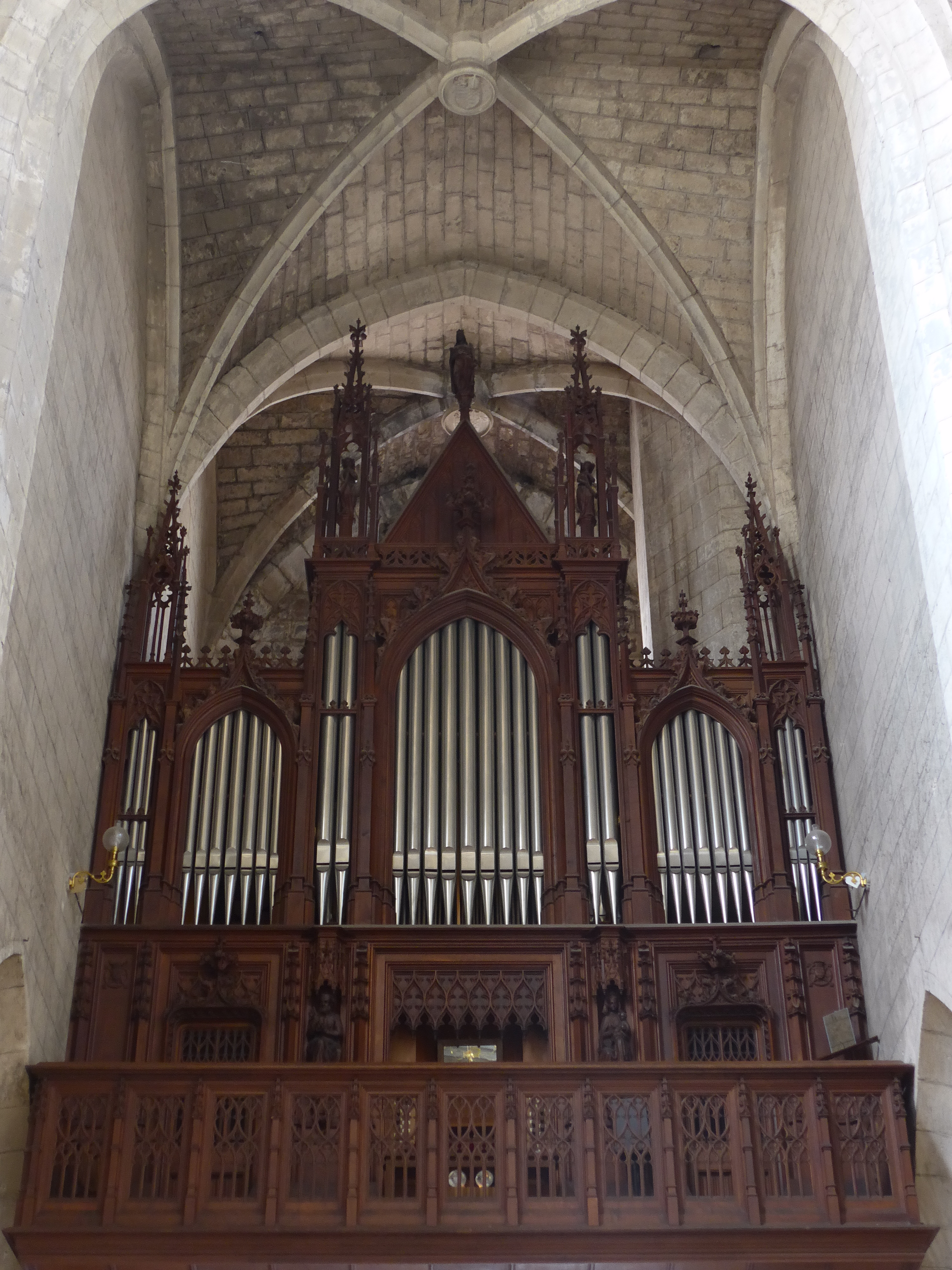 Cathédrale Saint-Pierre à l'intérieur en plus des orgues on remarque une fresque et le christ noir.